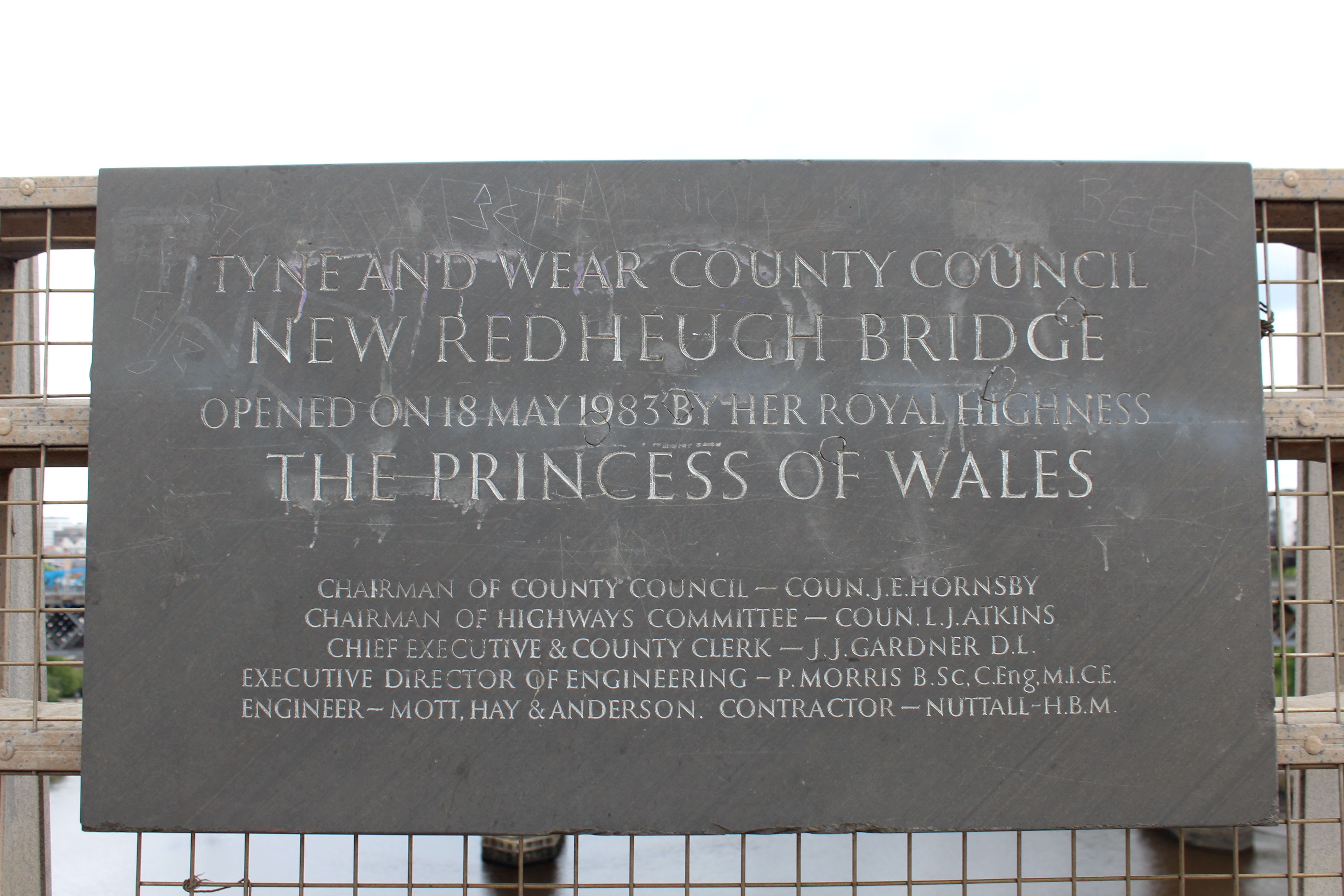 Plaque pour l'inauguration du pont Redheugh, Gateshead.